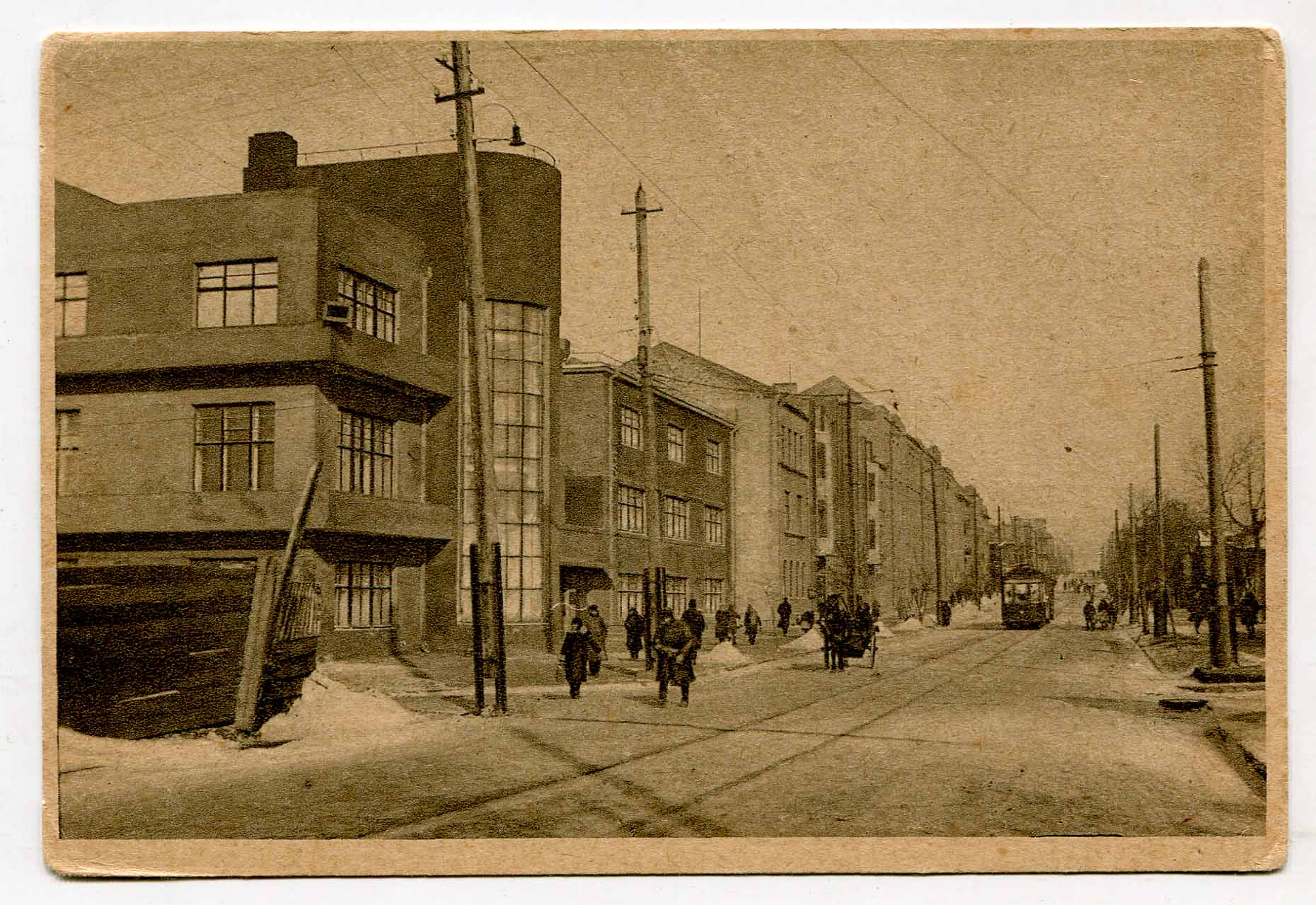 Вновь выстроенный клуб строителей, дальше видно корпус дома Страхкассы. г. Сталино.